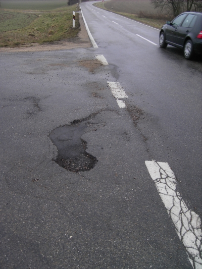 Straßenschaden an einer Staatsstraße